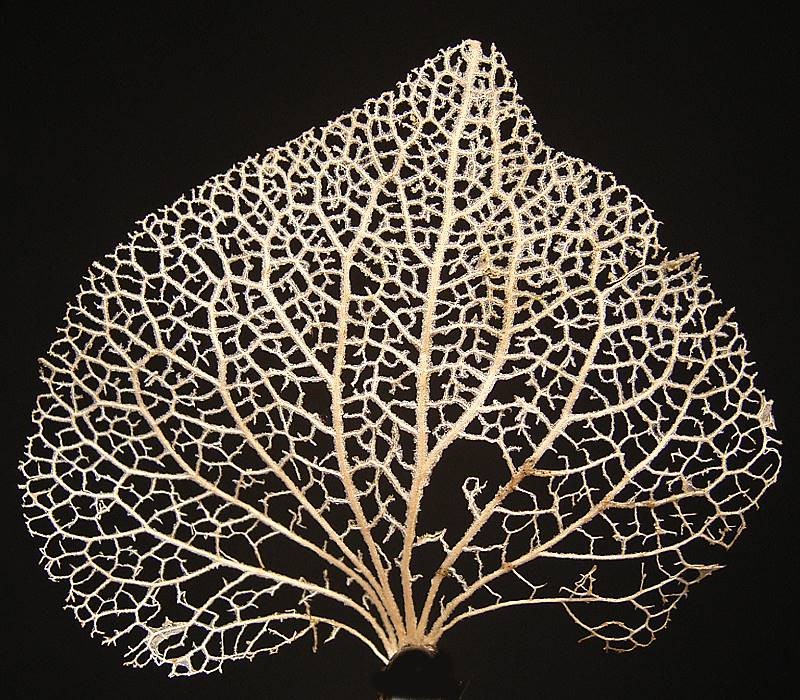 Vein skeleton hydrangea